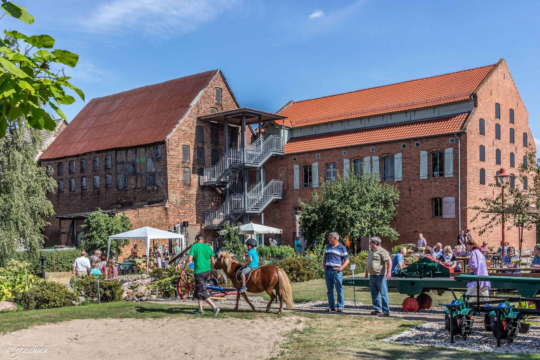 Tabakscheune/Tabakmuseum